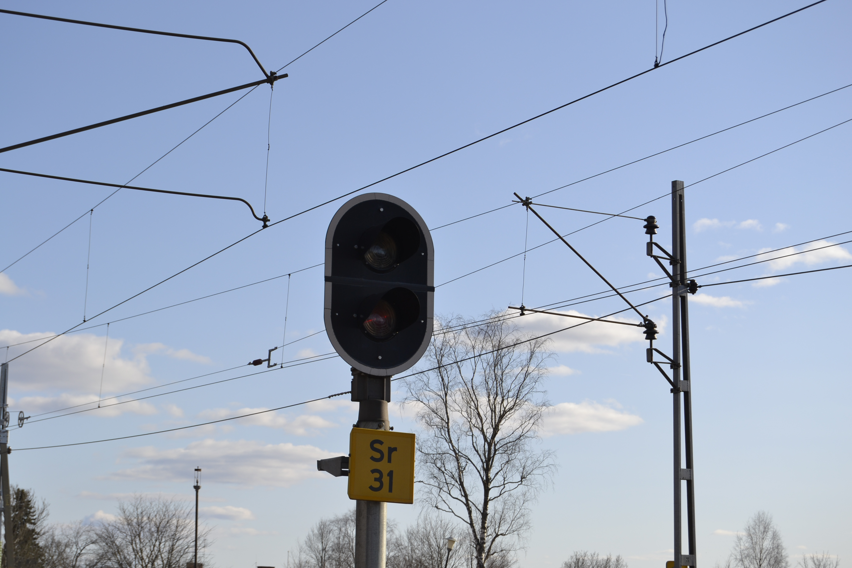 Huvudsignalen visar rött (stopp) strax innan Storå station.